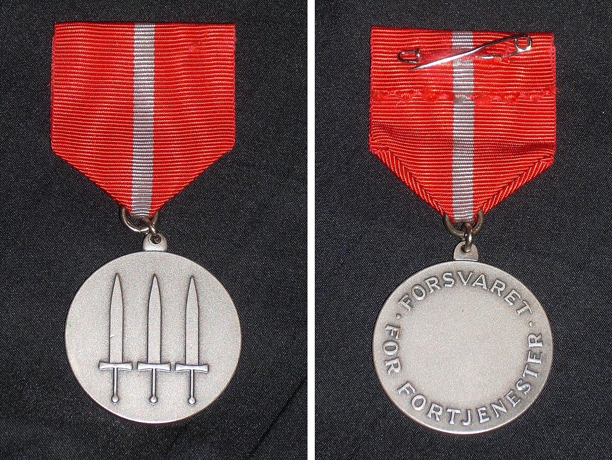 Den norske Forsvarsmedaljen fra min egen private samling